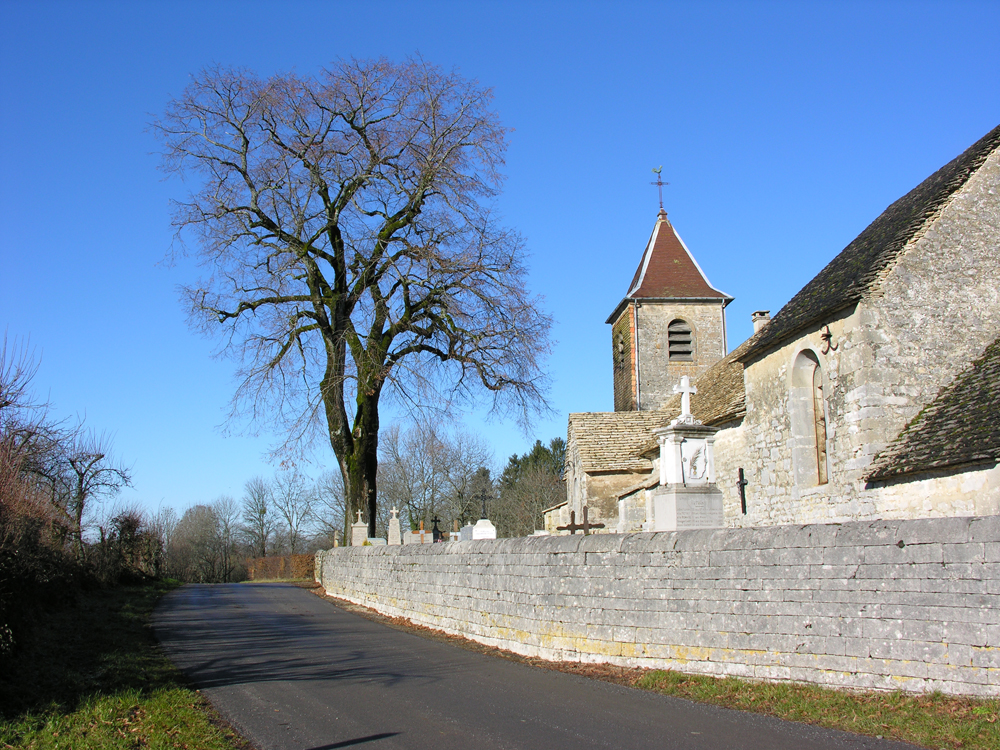 Église du village de Bonnefontaine, Jura.